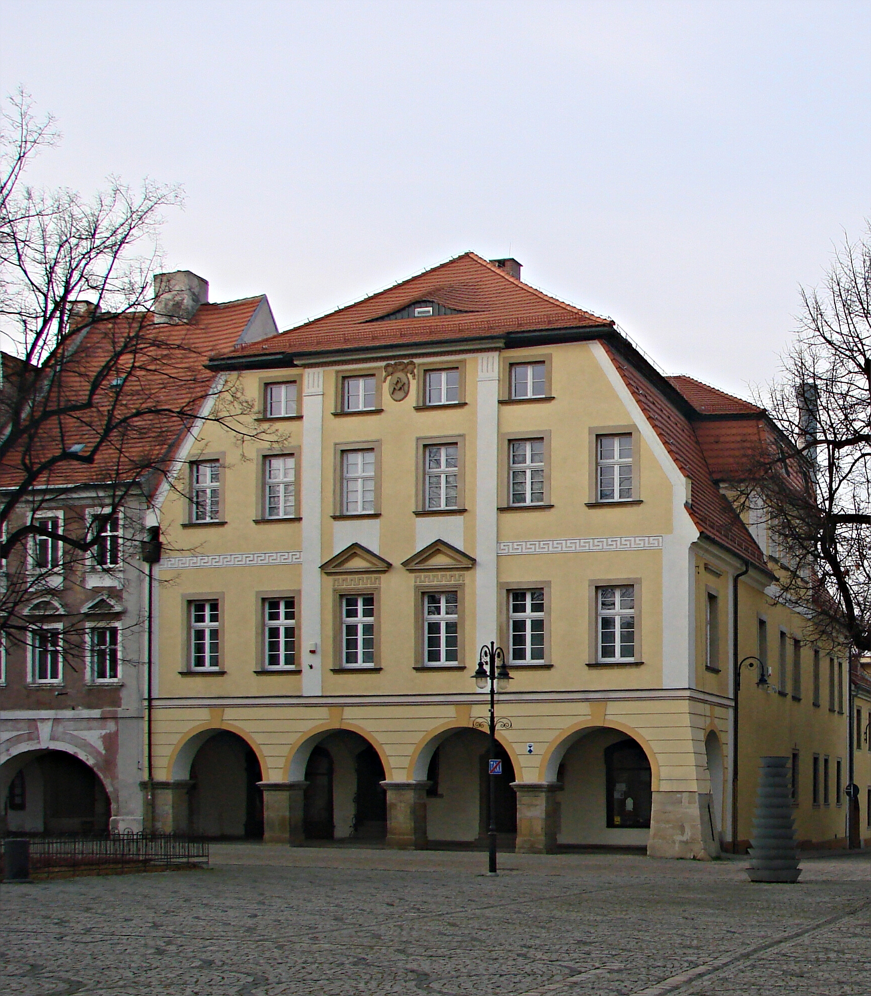 Kamienna Góra, pl. Wolności 11 - kamienica, obecnie Muzeum Tkactwa, XVIII, XIX w.